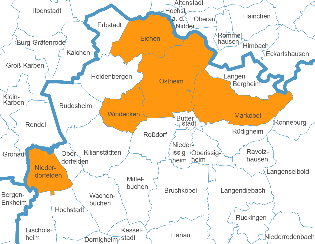 Karte der Ausmaße des Amtes Windecken der Grafschaft Hanau, dargestellt in den Gemarkungen heutiger Gemeinden bzw. Ortsteile. Nicht berücksichtigt sind Wüstungen, die heute innerhalb der Ortsteilgemarkungen bestanden.